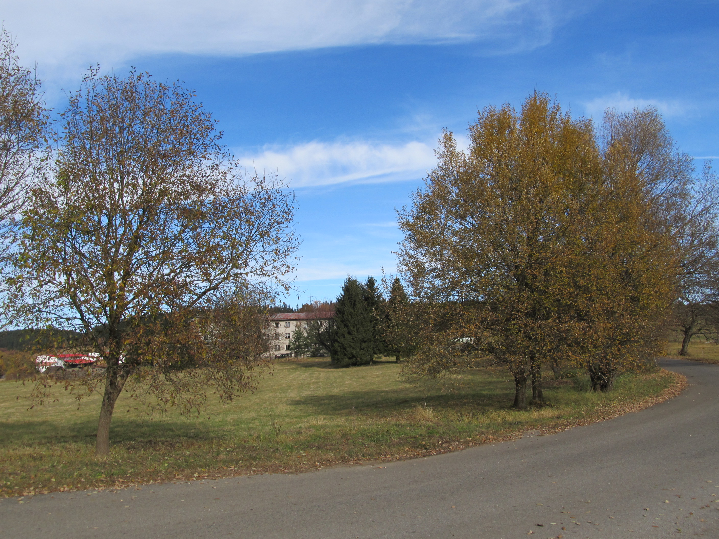 Keply